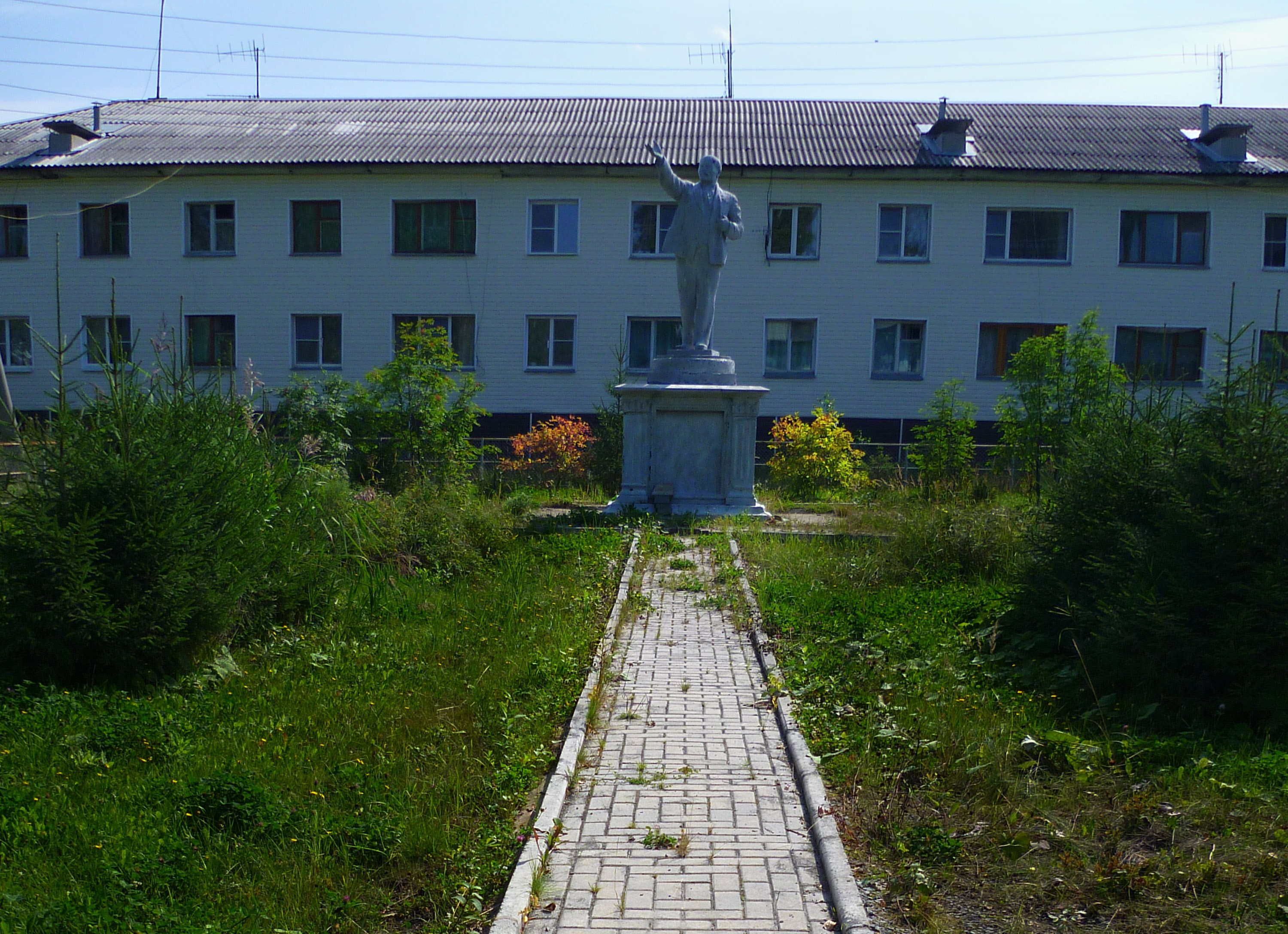 Памятник Ленину в посёлке Тайгинка